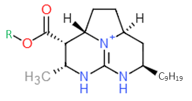 Estructura molecular de la batzelladina D